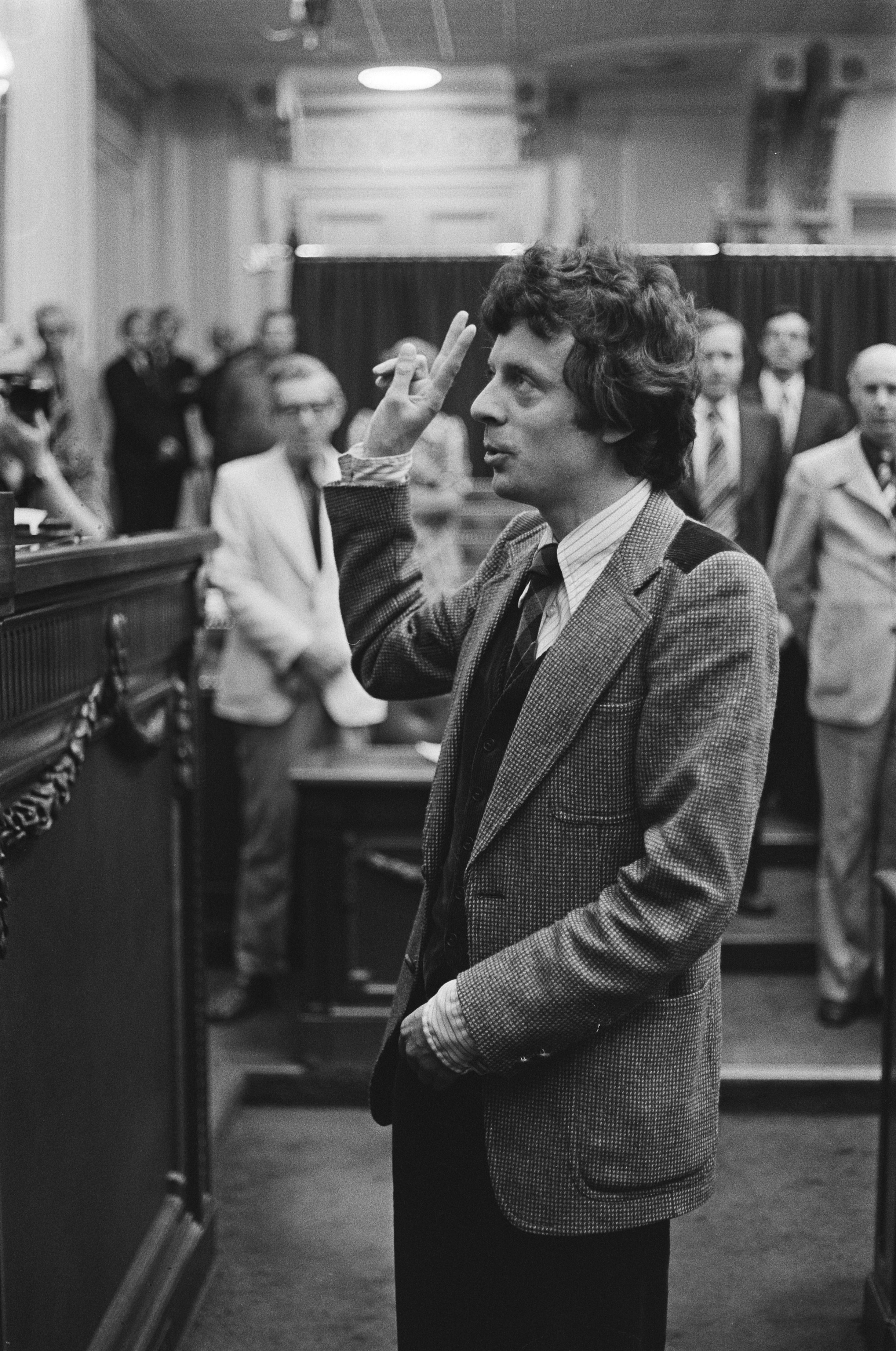 Collectie / Archief : Fotocollectie Anefo Reportage / Serie : Tweede Kamer bijeen na zomerreces 1977 Beschrijving : Beëdiging R. Nijhof van DS'70 Datum : 24 augustus 1977 Locatie : Den Haag, Zuid-Holland Trefwoorden : ambtsaanvaardingen, parlementariërs, politiek Persoonsnaam : Nijhof, R.E.F.M Instellingsnaam : DS'70 Fotograaf : Peters, Hans / Anefo Auteursrechthebbende : Nationaal Archief Materiaalsoort : Negatief (zwart/wit) Nummer archiefinventaris : bekijk toegang 2.24.01.05 Bestanddeelnummer : 929-3183